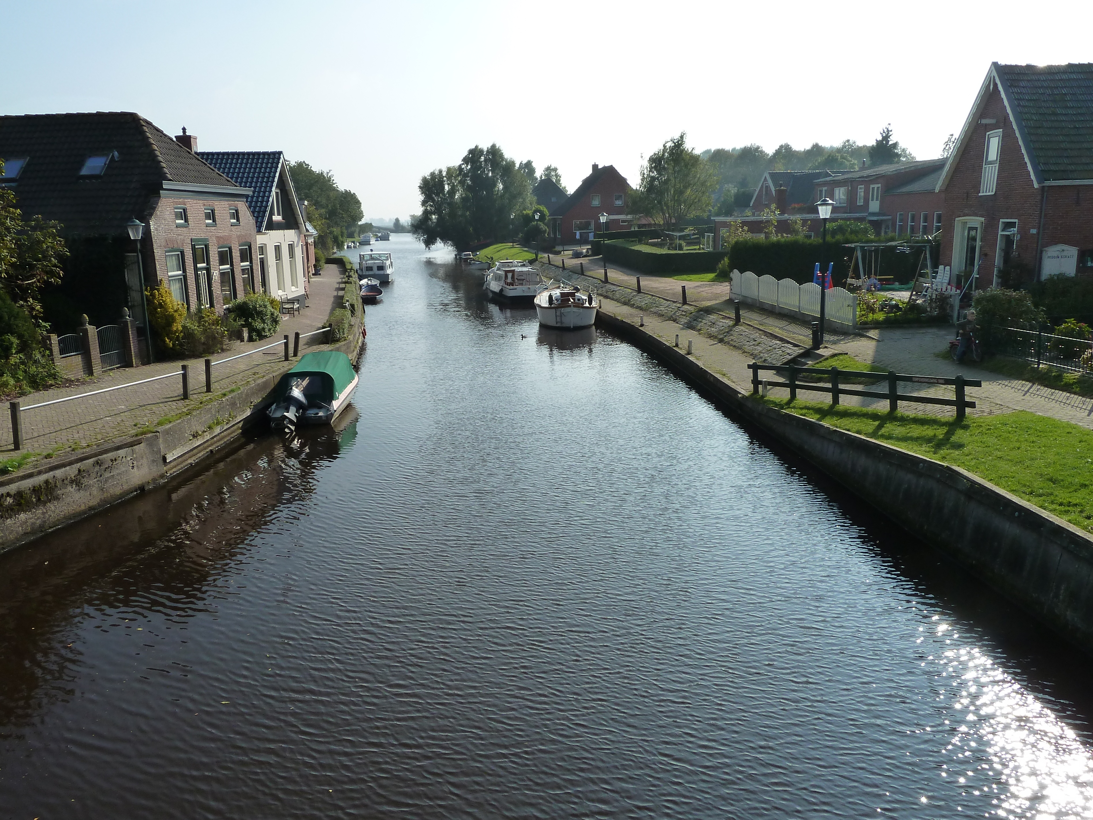 Kommerzijlsterdiep gezien vanaf de sluis in Kommerzijl.